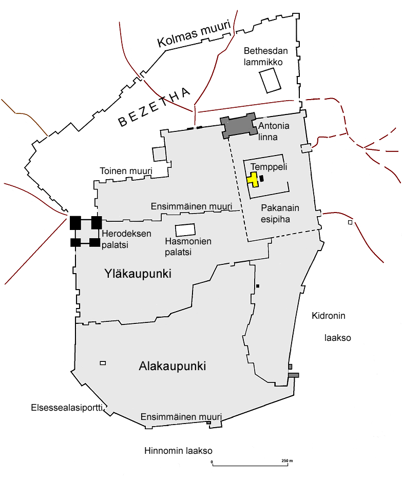 Jerusalemin kartta ensimmäisellä vuosisadalla. Suomenkieliset nimet kirjasta Flavius Josefus: Juutalaissodan historia. WSOY, 2003. ISBN 951-0-28945-0. Map of Jerusalem 1:st century.